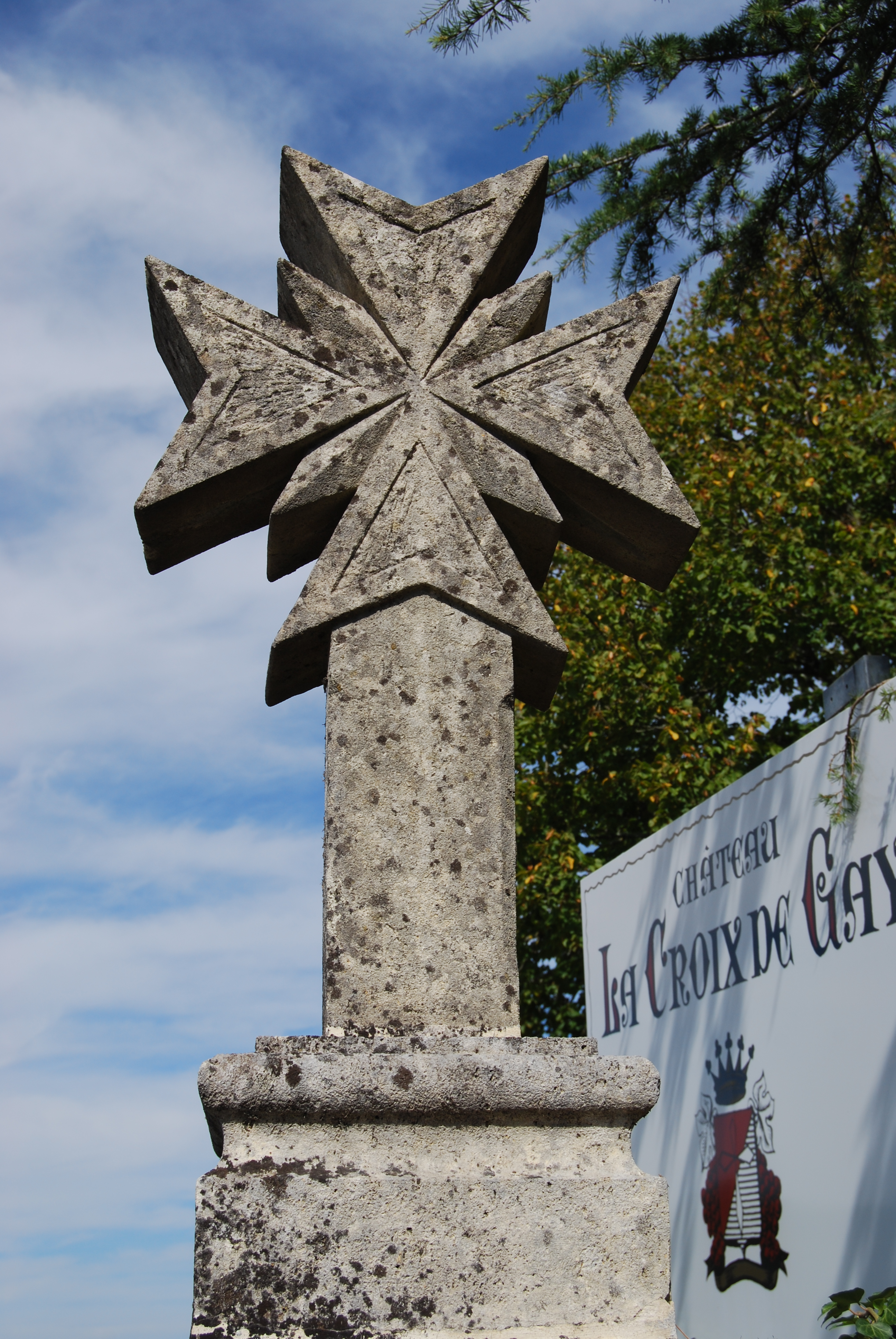 Croix de Gay, (Inscrit, 1987) .